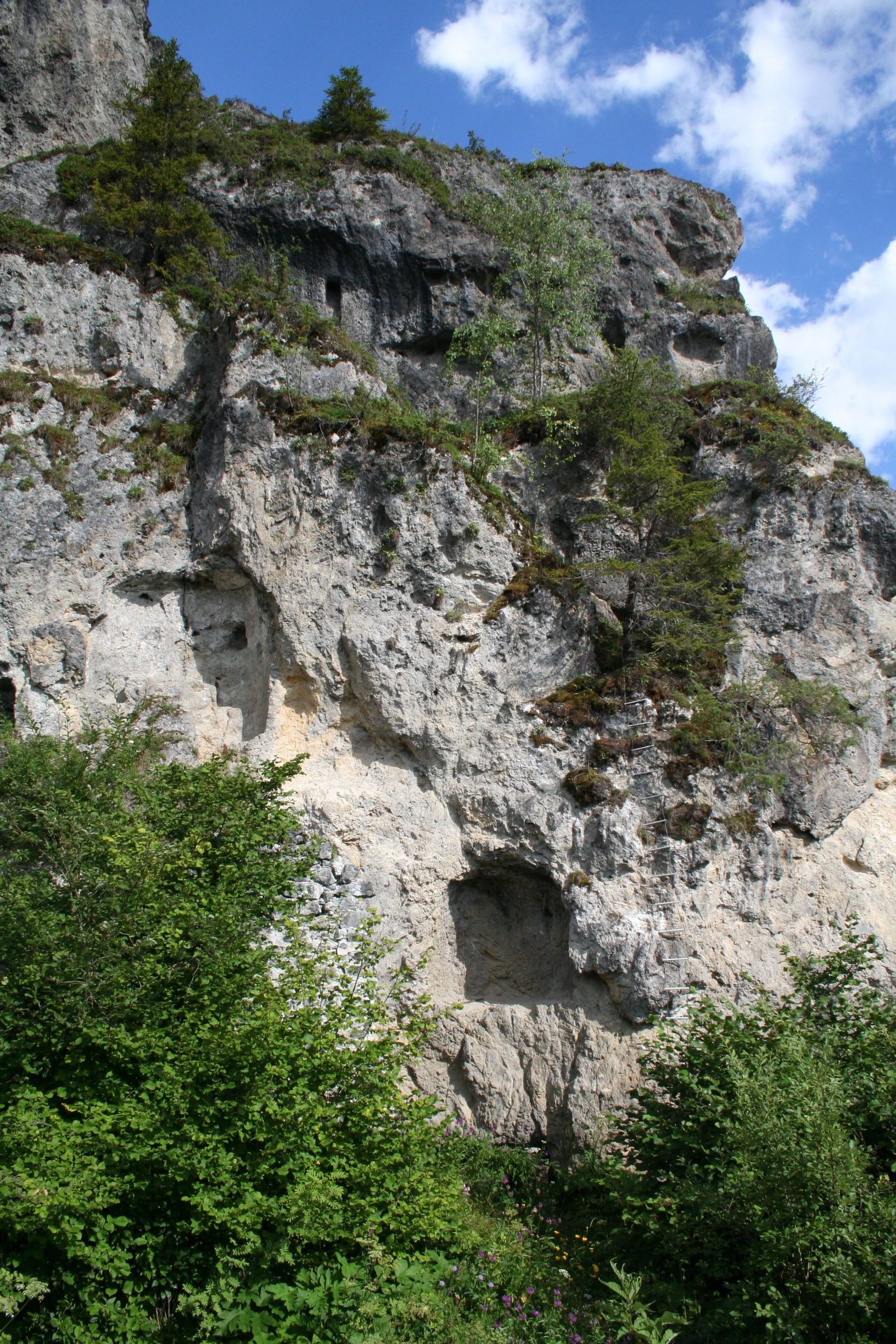 Ostseite